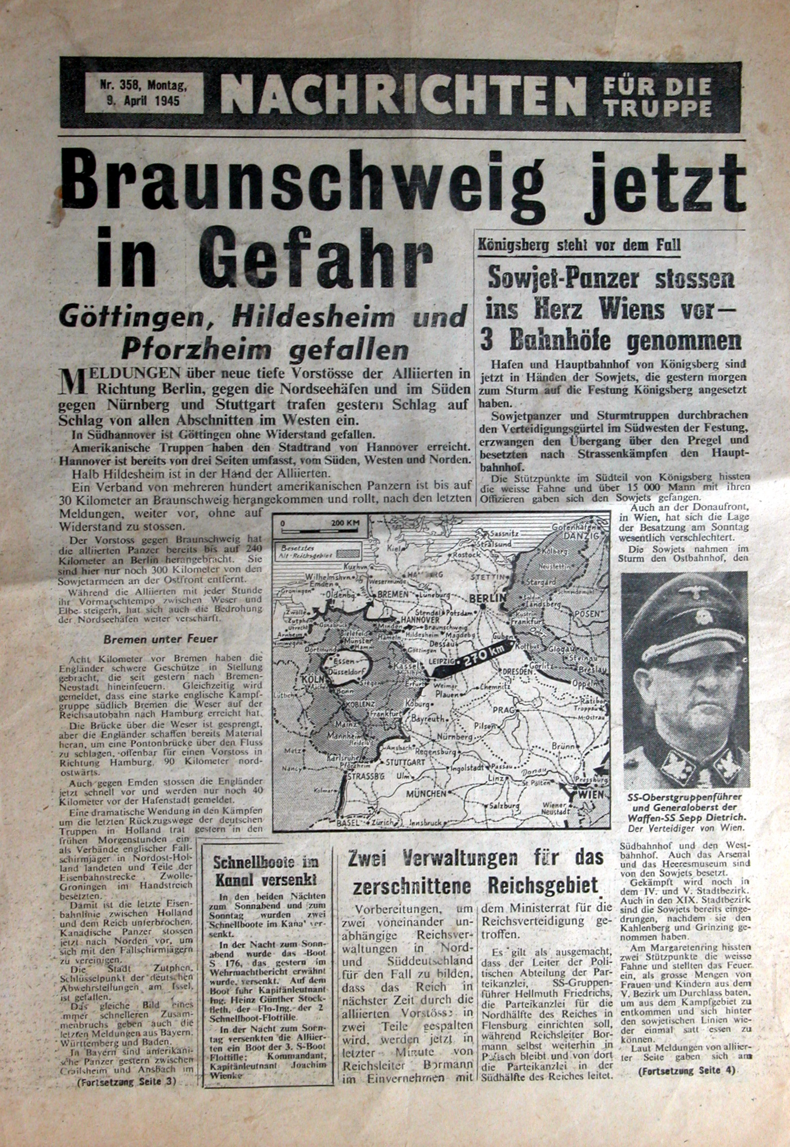 Nachrichten für die Truppe, Nr. 358, Montag, 9. April 1945 (alliiertes Propagandamaterial)